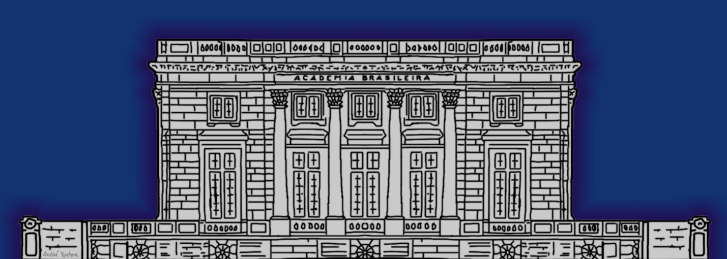 Petit Trianon - sede da Academia Brasileira de Letras - Rio de Janeiro (RJ) - Brasil.